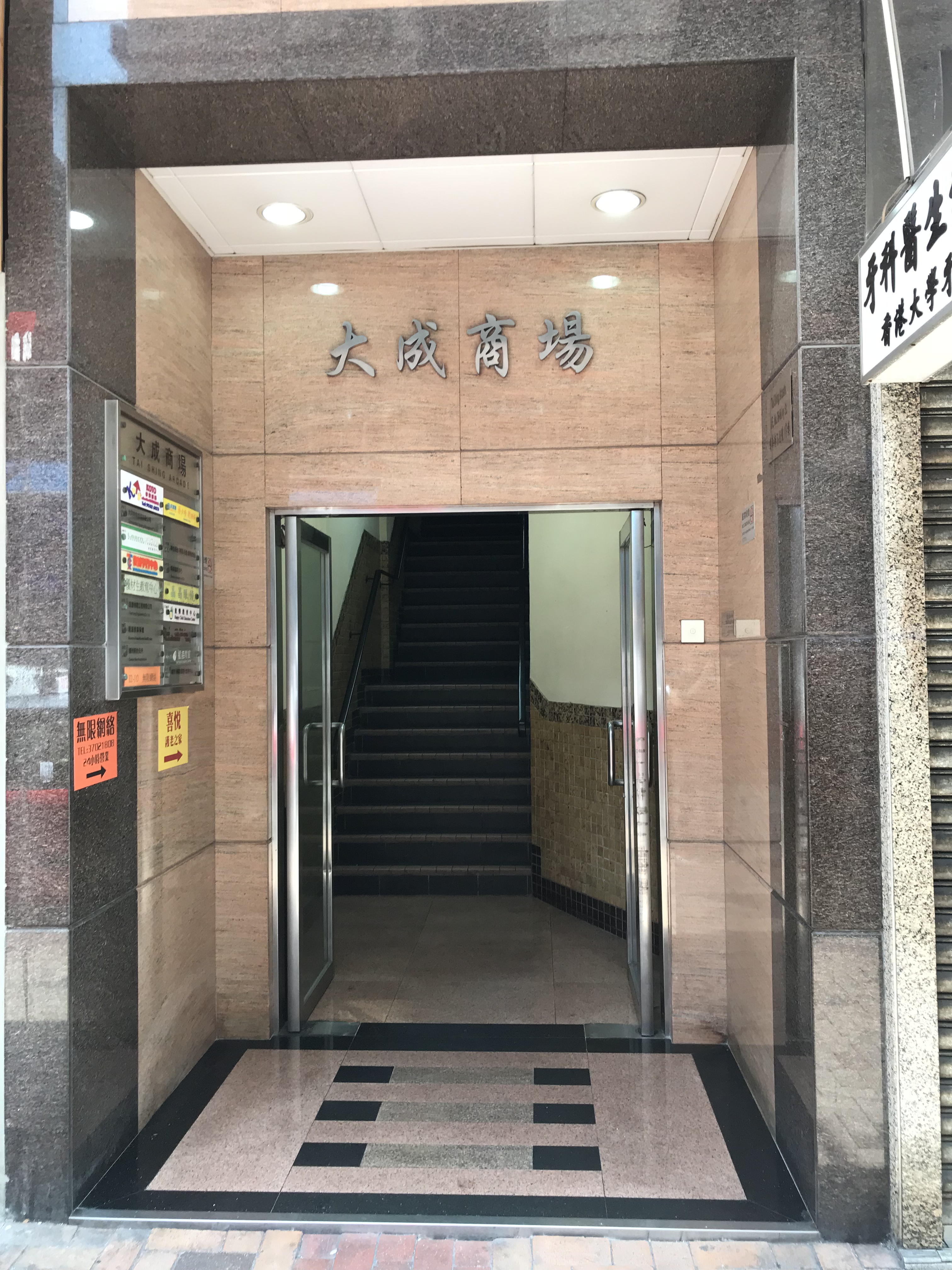 中文（香港）: 大同新邨大成商場